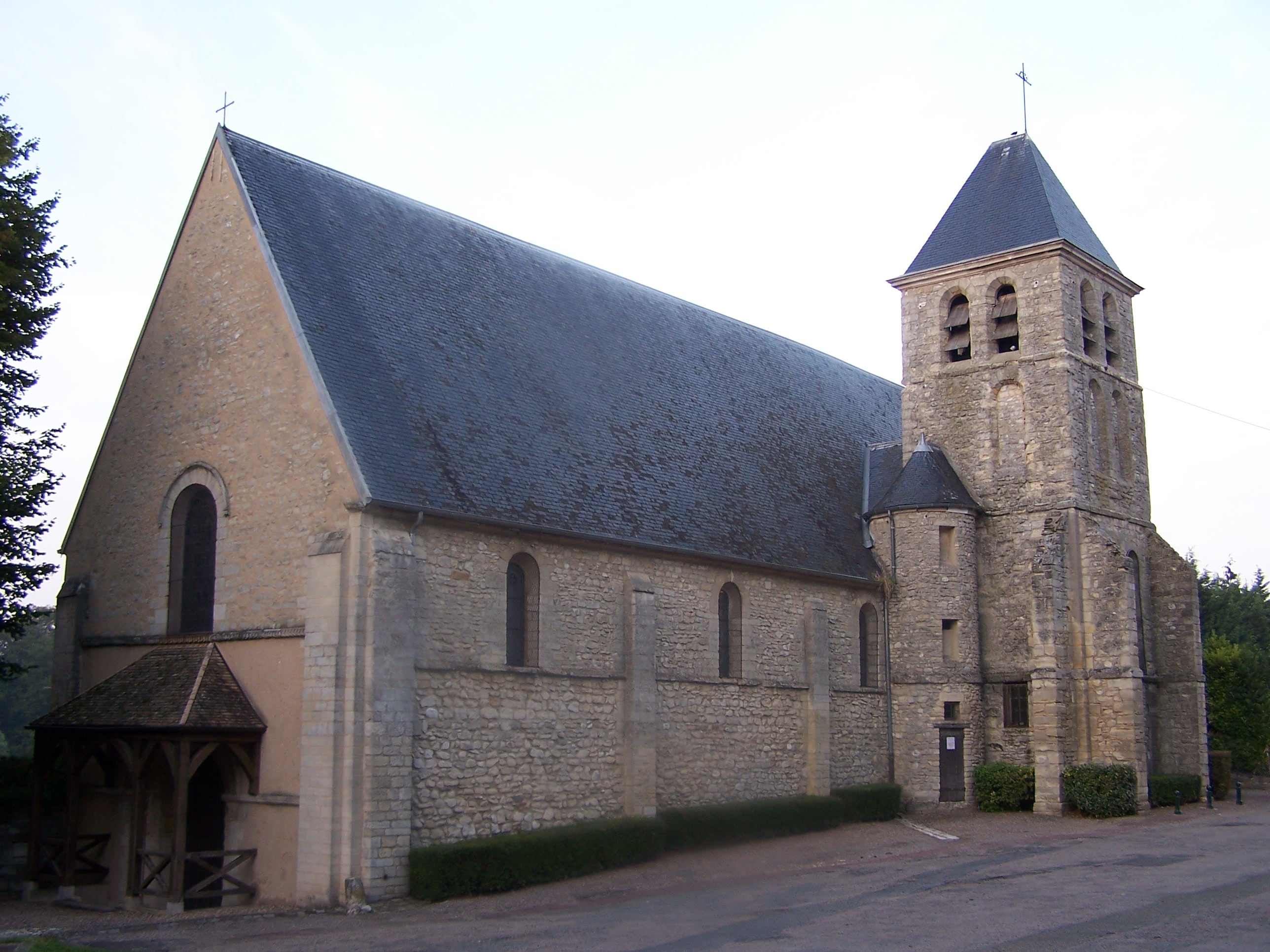 Église de Davron (Yvelines, France)